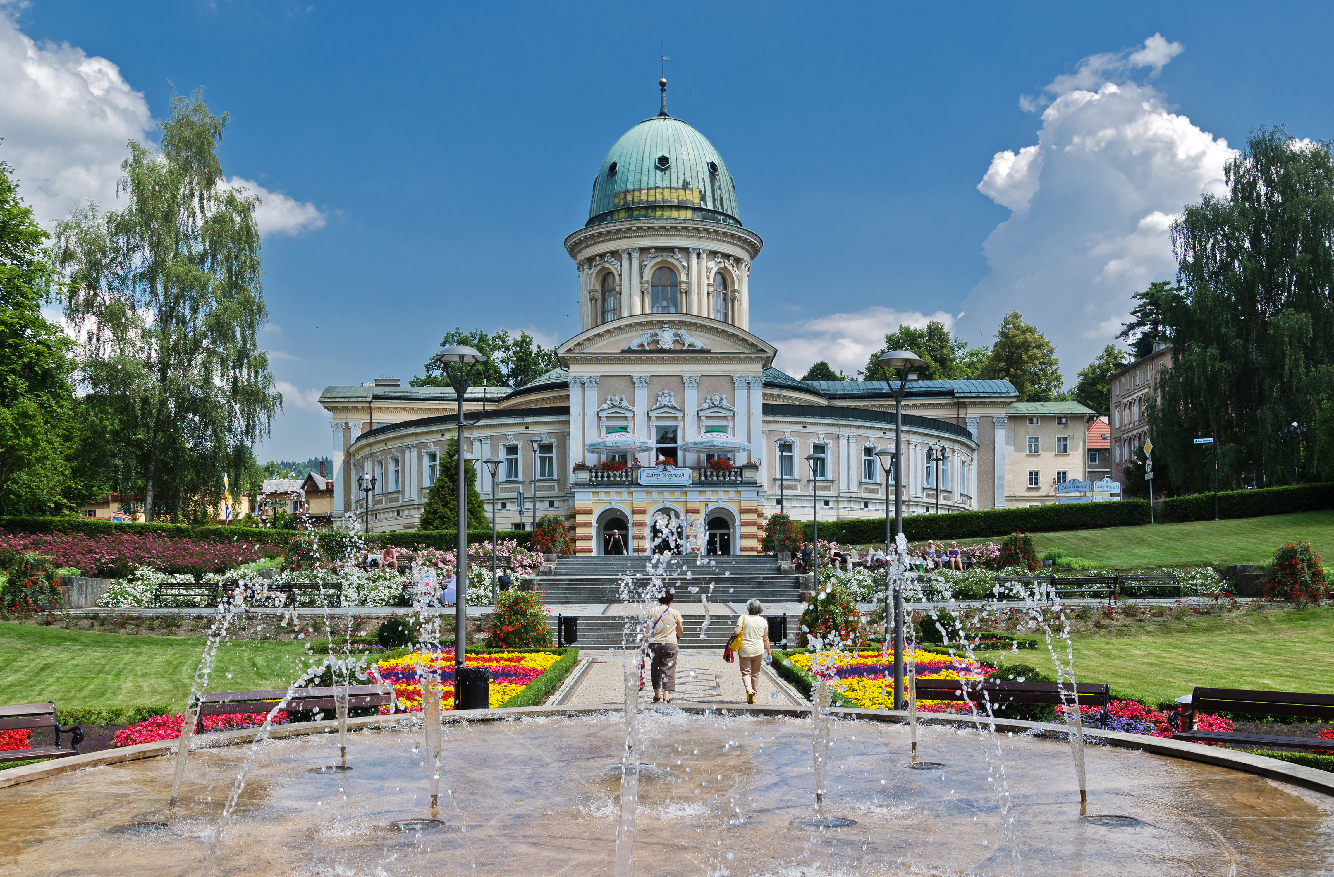 Lądek-Zdrój, d. park Centralny,ob. Park Zdrojowy im. Jana Pawła II, k. XVIII-XIX